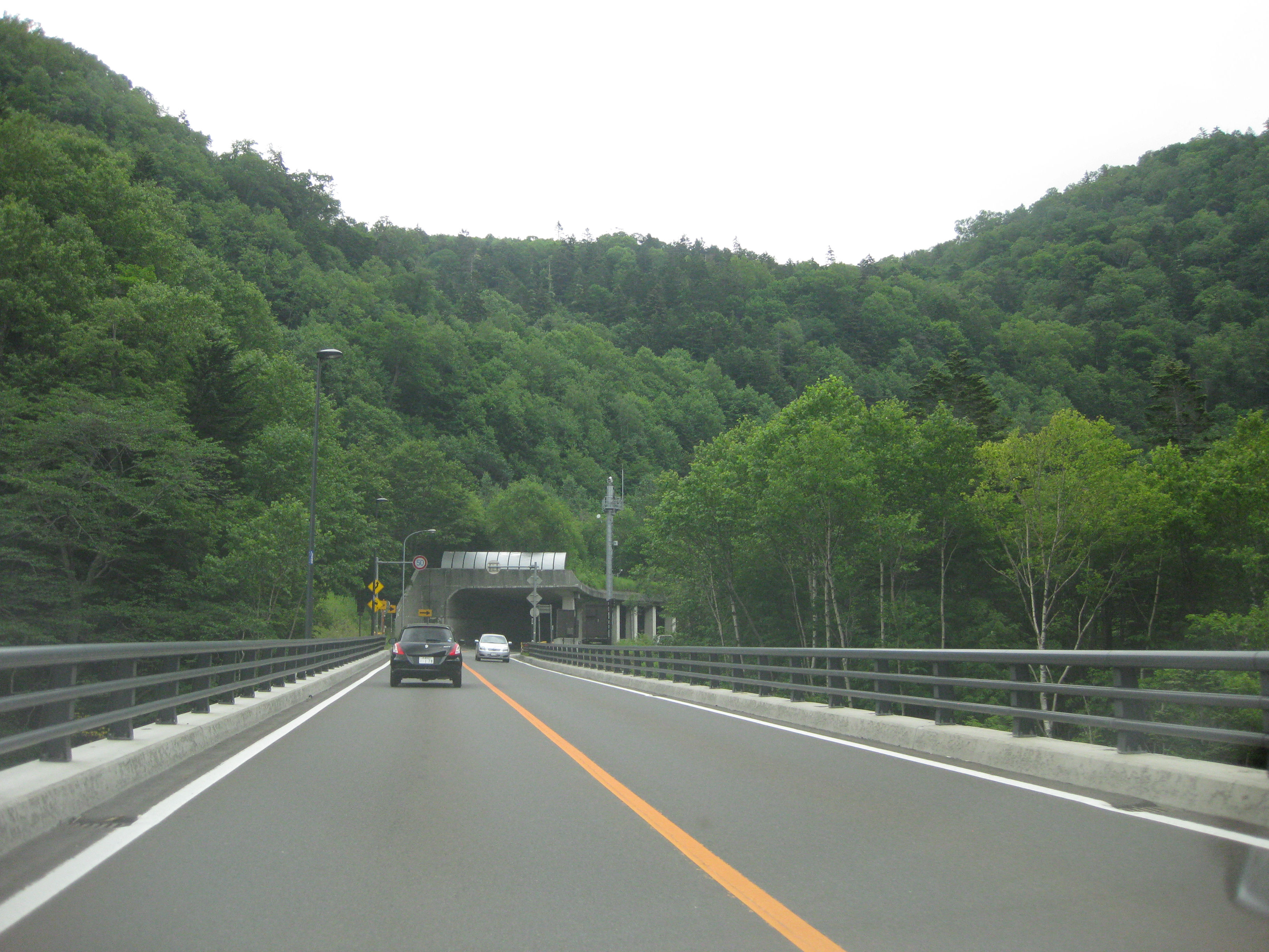 国道２３０号中山峠上り方向 定山渓トンネル手前